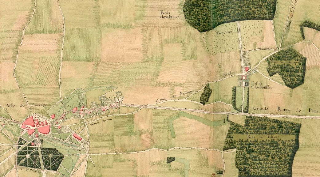 Atlas de Trudaine pour la Généralité de Paris. Département de Compiégne. N° XI. Grande route de Paris à Sézanne passant par Tournam et Rozoy, conduisant à Vitry-le-François. Portion de route à partir de Fontenay-Trésigny ("Fontenay"), passant entre le bois de "Vilbert" et le bois de "La-Hampe" non loin du fief de "Chaubuisson", et allant jusqu'à hauteur de "Vilbert", du fief de "Richebourg", et du bois de "Lagorez".